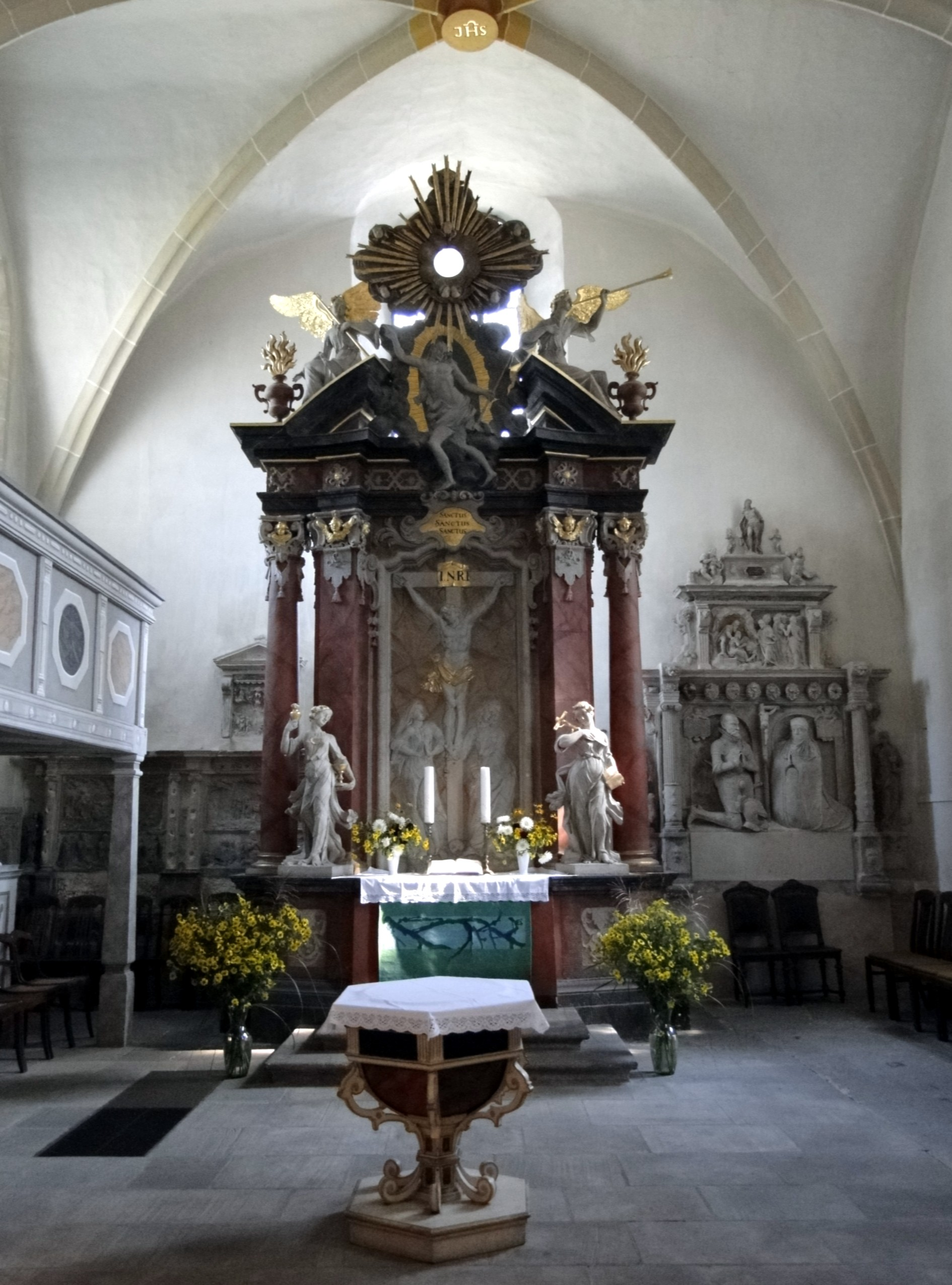 Chorraum und Altar Kirche Leubnitz-Neuostra